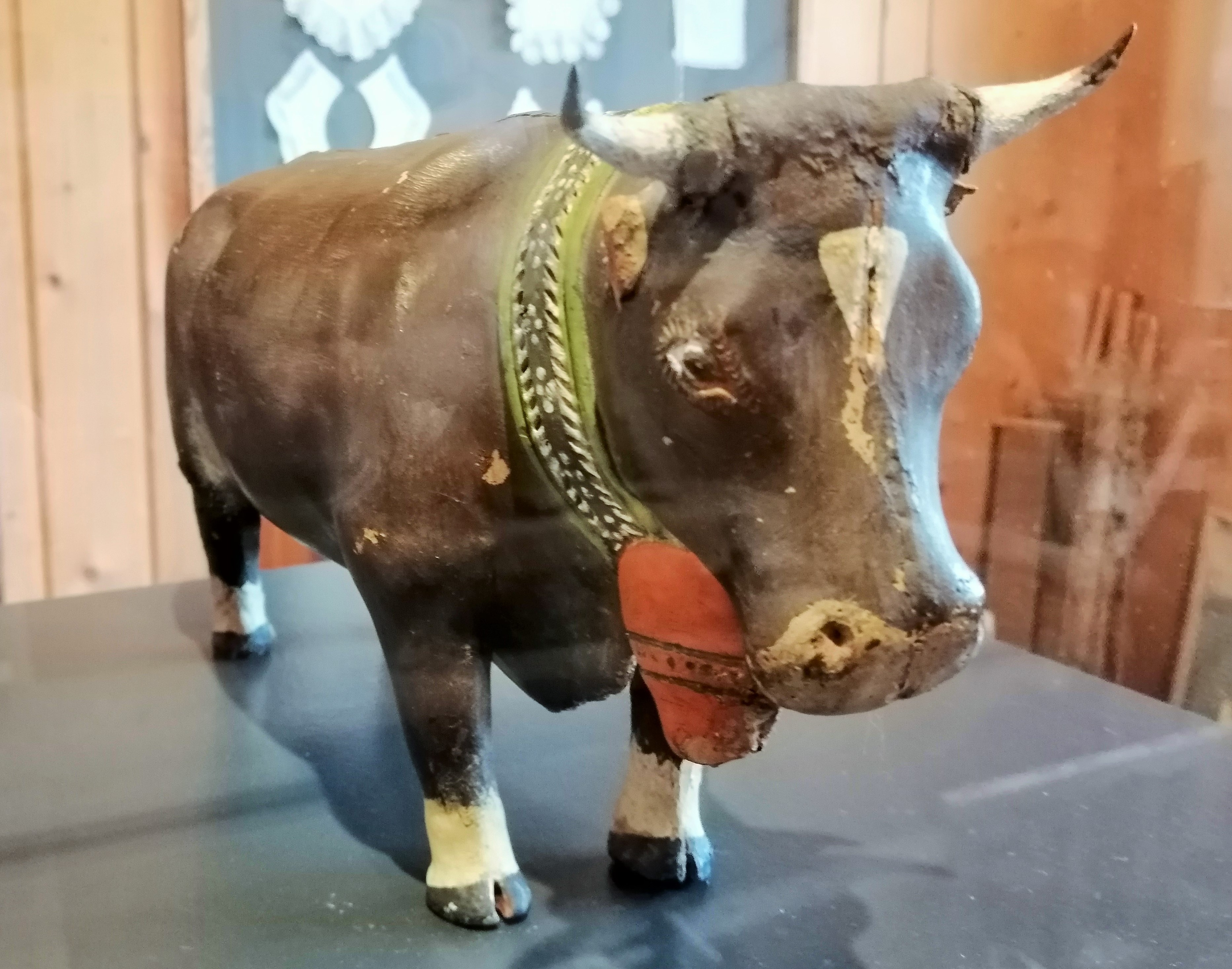 Ortsmuseum St. Antönien, Prättigau GR, Schweiz